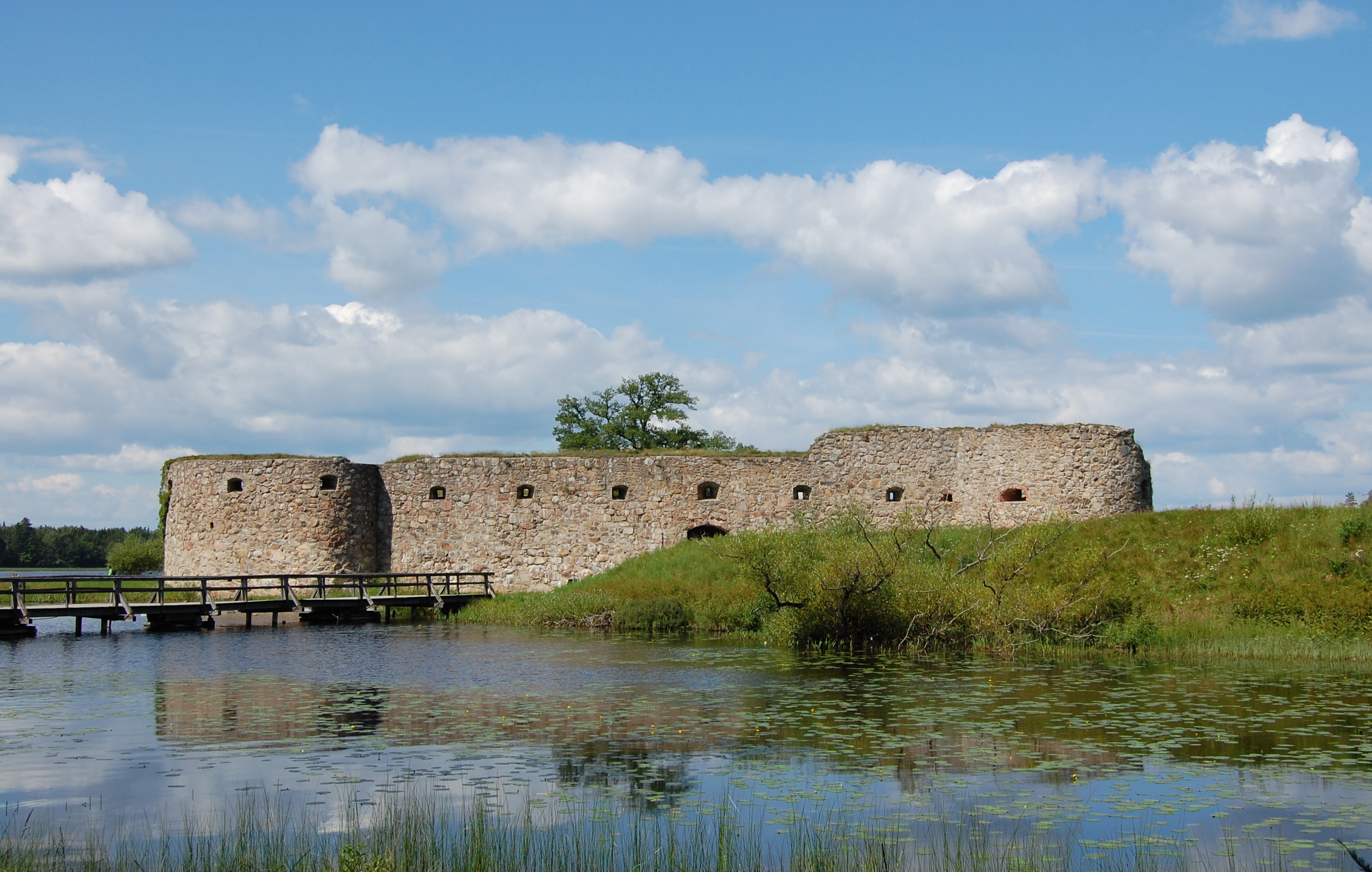 Blick auf die Festung Kronoberg, im Vordergrund die Insel Stallholmen